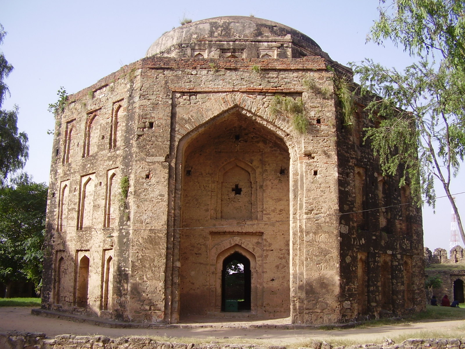 Building inside Rawat Fort Punjab Pakistan